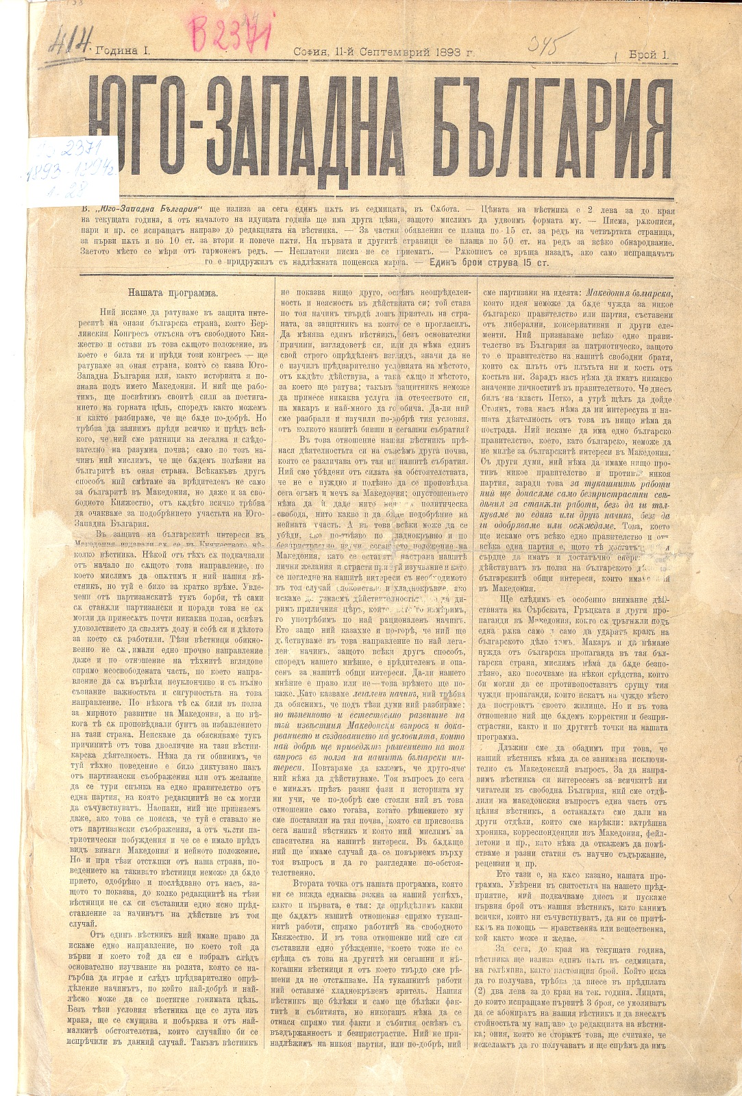 Вестник "Югозападна България", брой 1, 11 септември 1893.